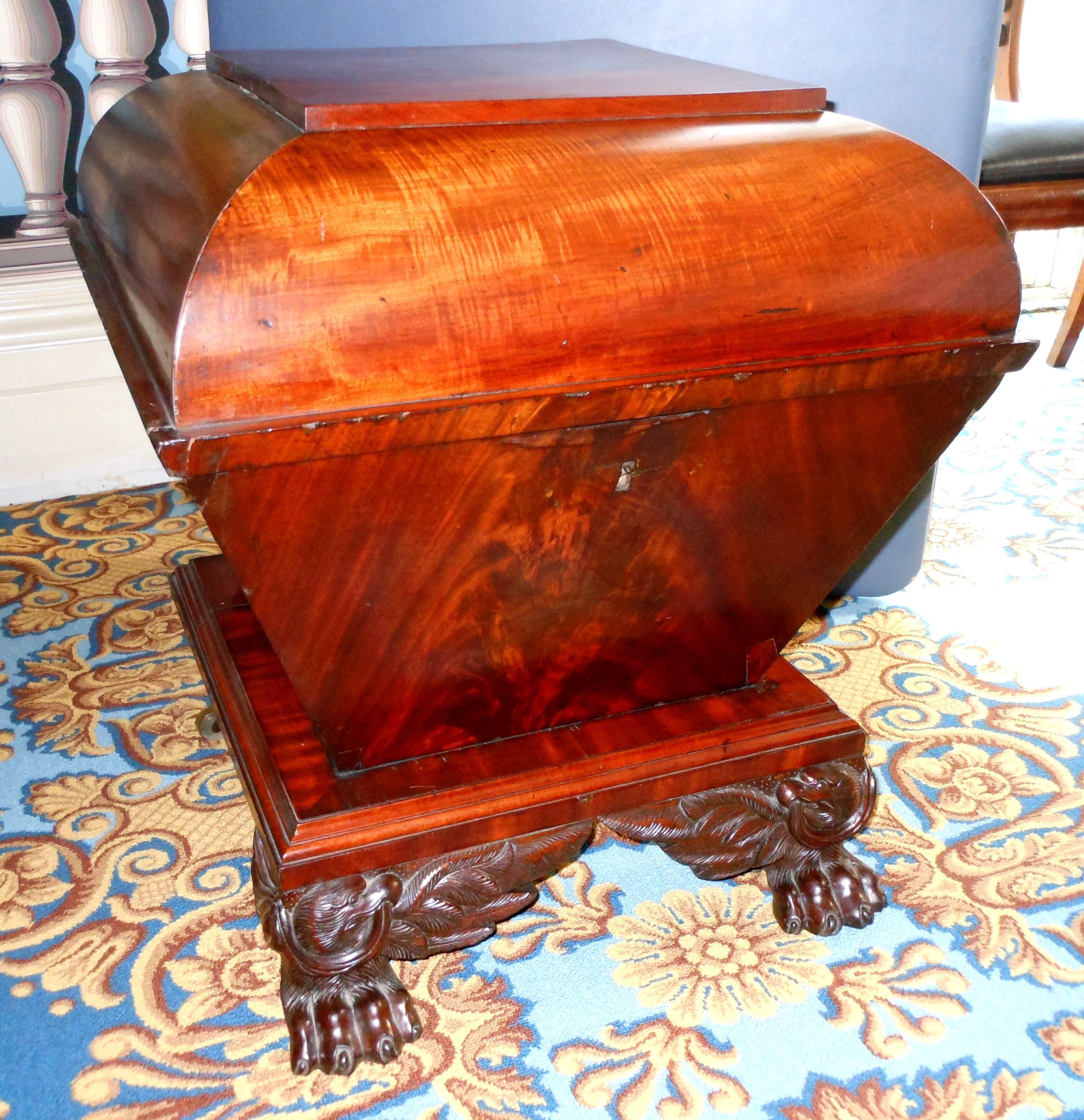 Cellarette at Lanier mansion in Madison, Indiana